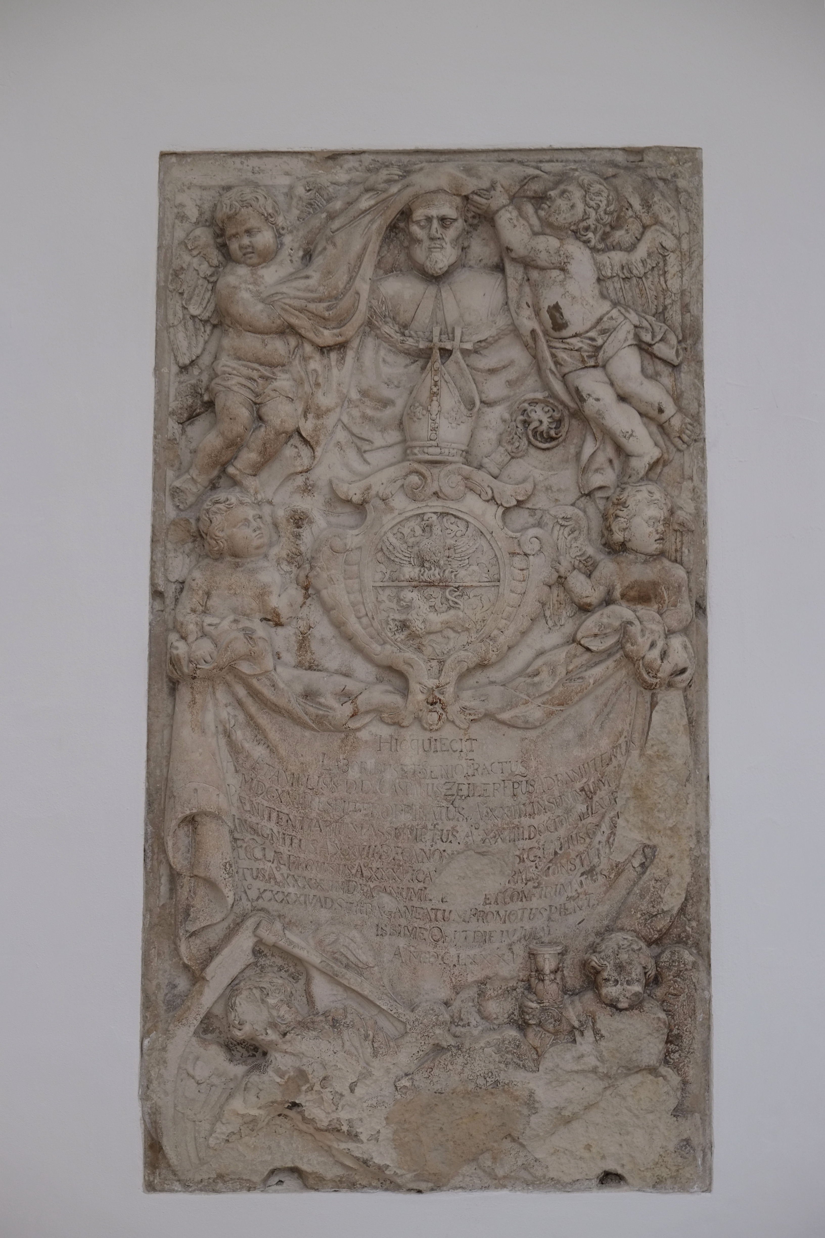 St. Moritz in Augsburg (Bayern, Deutschland), Epitaph für Kaspar Zeiler (* 1594 in Mainwangen; † 4.7.1681 in Augsburg), Generalvikar, Weihbischof von Augsburg